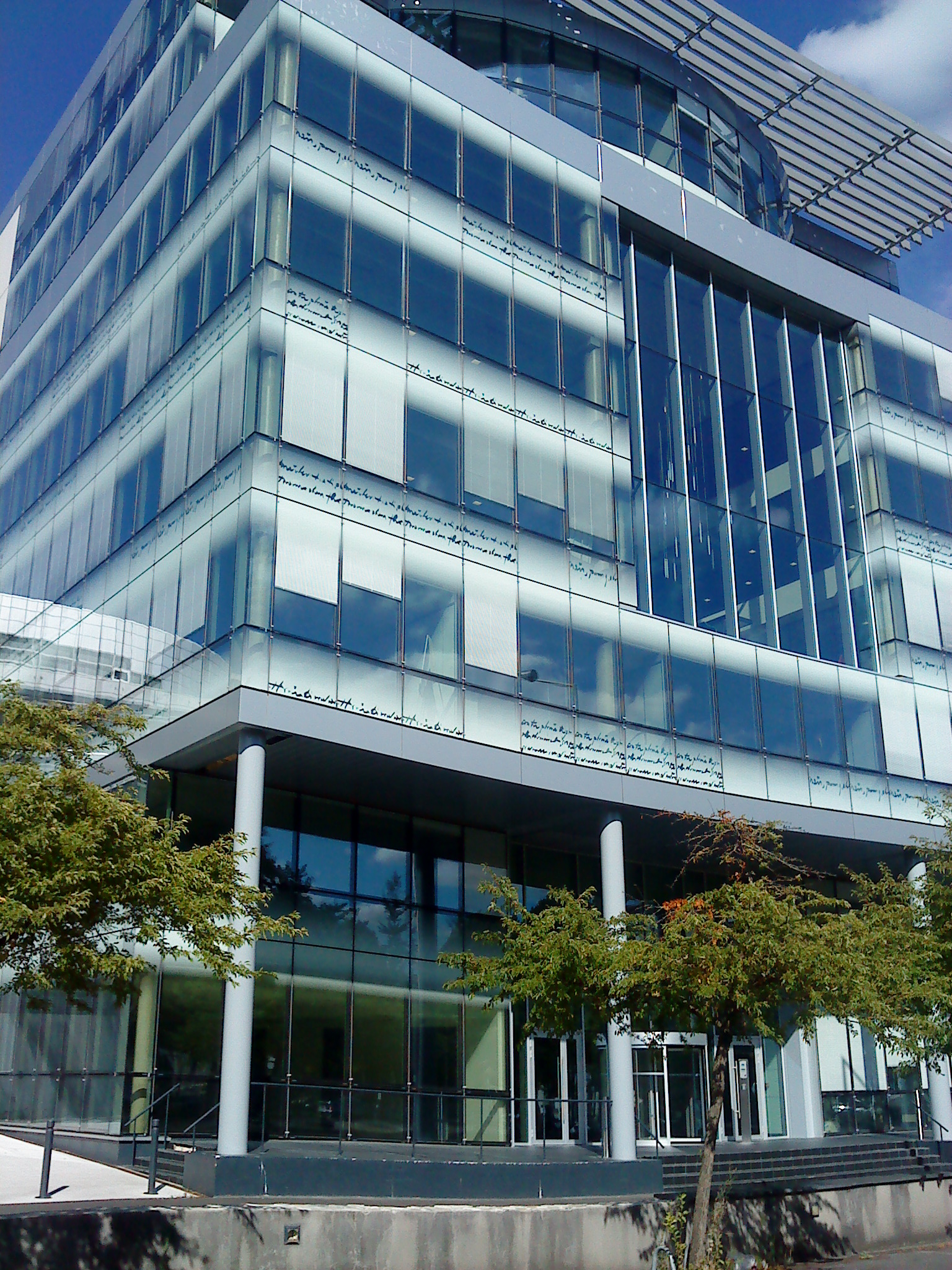 Tour Saint-Serge, Angers